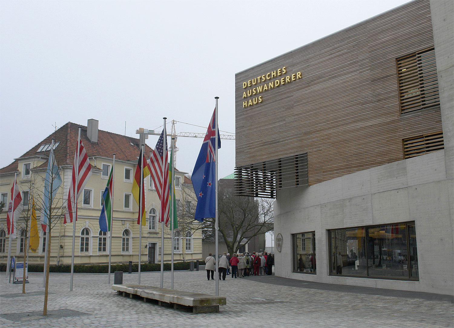 Museum Bremerhaven: German Emigration Center Native nameDeutsches AuswandererhausLocationColumbusstraße 6527568 Bremerhaven, Bremen GermanyCoordinates53° 32′ 43.08″ N, 8° 34′ 27.01″ E Established8 August 2005Web pageDeutsches AuswandererhausAuthority control : Q318809 VIAF: 131244556 LCCN: nr2005008075 GND: 16035841-3 SUDOC: 118763741 WorldCat institution QS:P195,Q318809